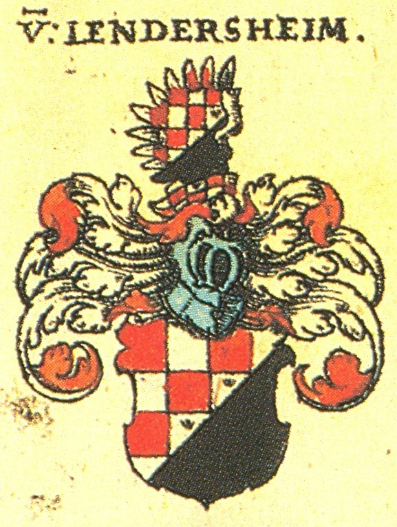 Wappen der Fränkischen Adelsfamilie Liechtenstein